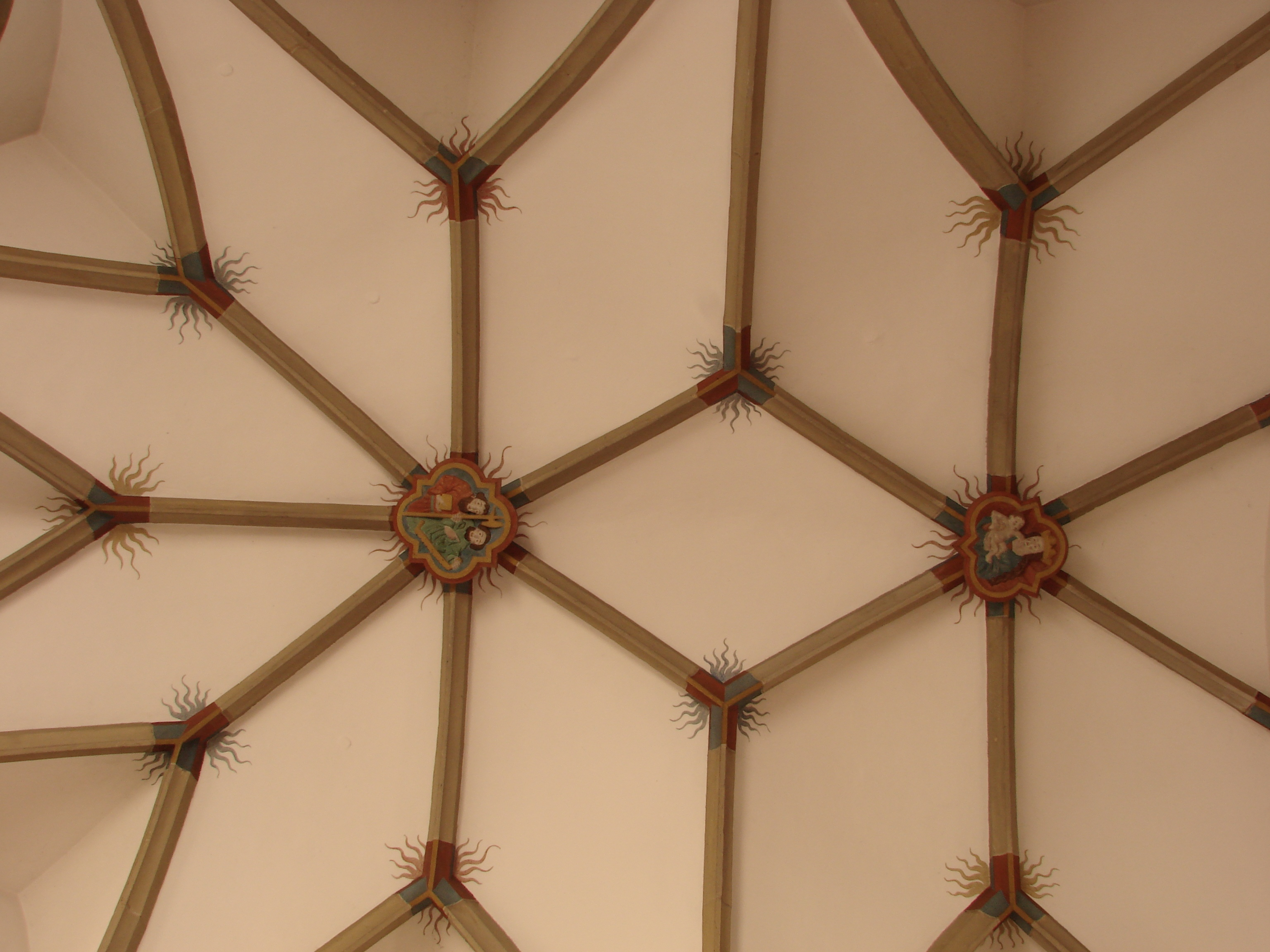 Freiberg am Neckar, church of Simon and Judas, choir vault